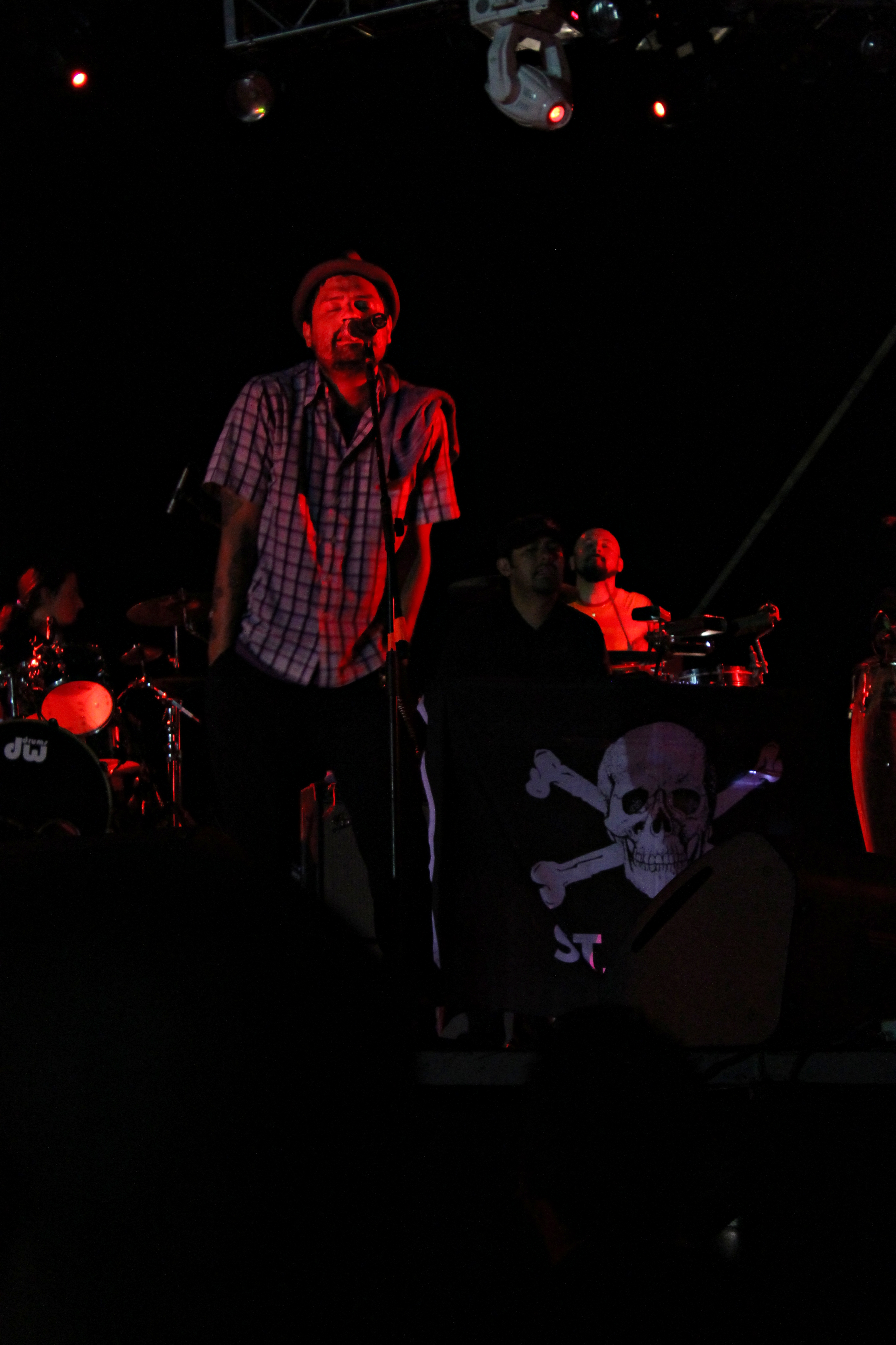 Concierto De Panteón Rococo En Cancun el 2 De Noviembre de 2011